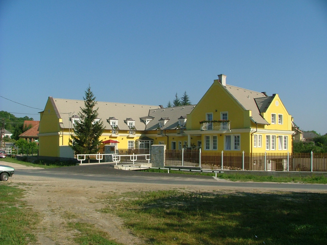 Ravazd, idősek otthona. Új intézmény 2004 augusztusa óta.